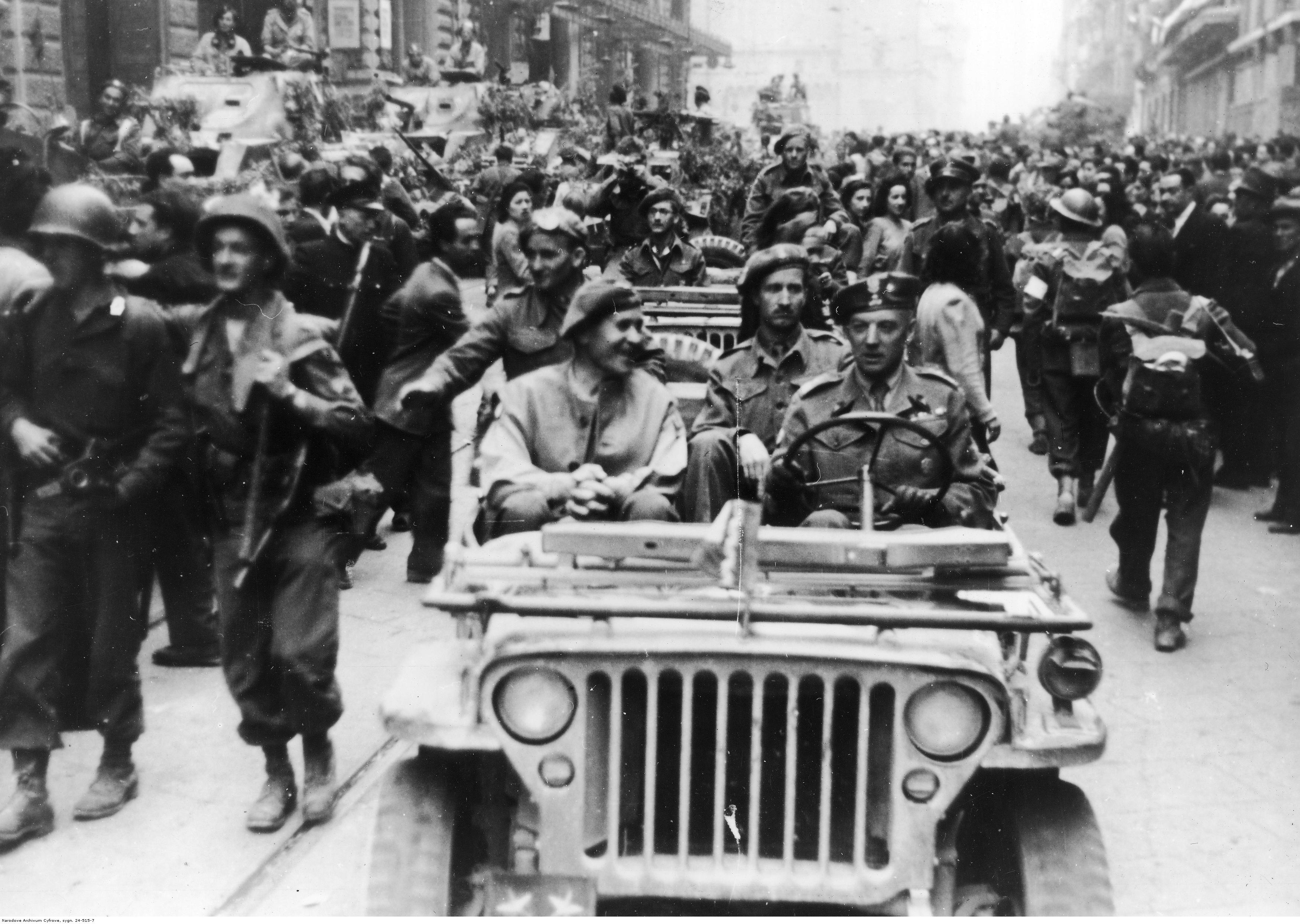 Wkroczenie polskich oddziałów 2 Korpusu Polskiego do Bolonii. Generałowie Zygmunt Bohusz-Szyszko (1. z lewej) i Klemens Rudnicki (za kierownicą) w samochodzie Willys MB w otoczeniu żołnierzy alianckich i ludności. Z lewej strony widoczne samochody pancerne T17 (Staghound). Archiwum Fotograficzne Tadeusza Szumańskiego. Sygnatura: 24-515-7